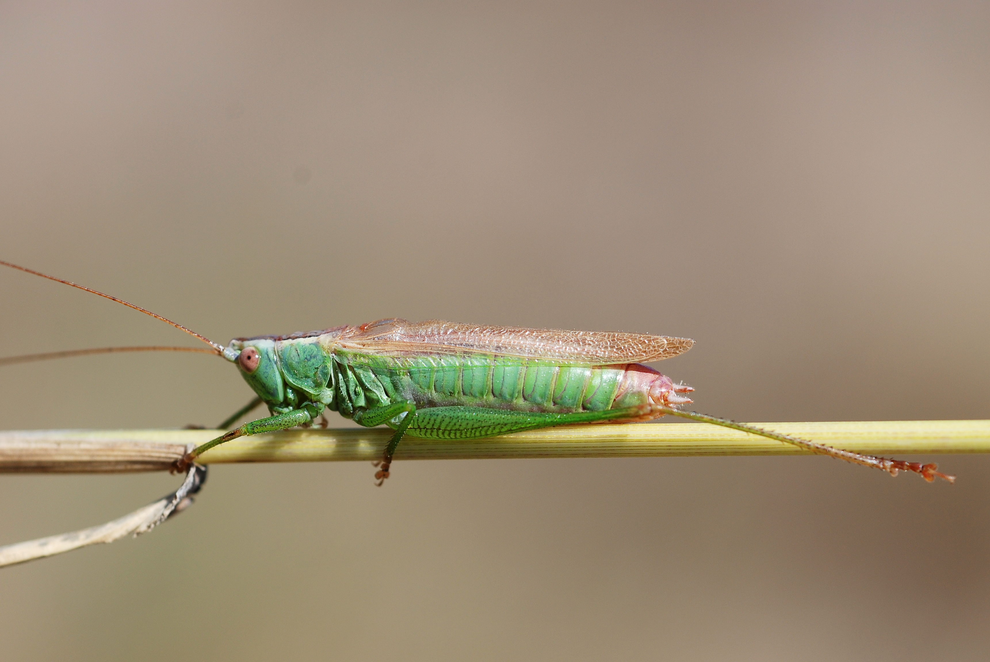 Conocephalus fuscus male